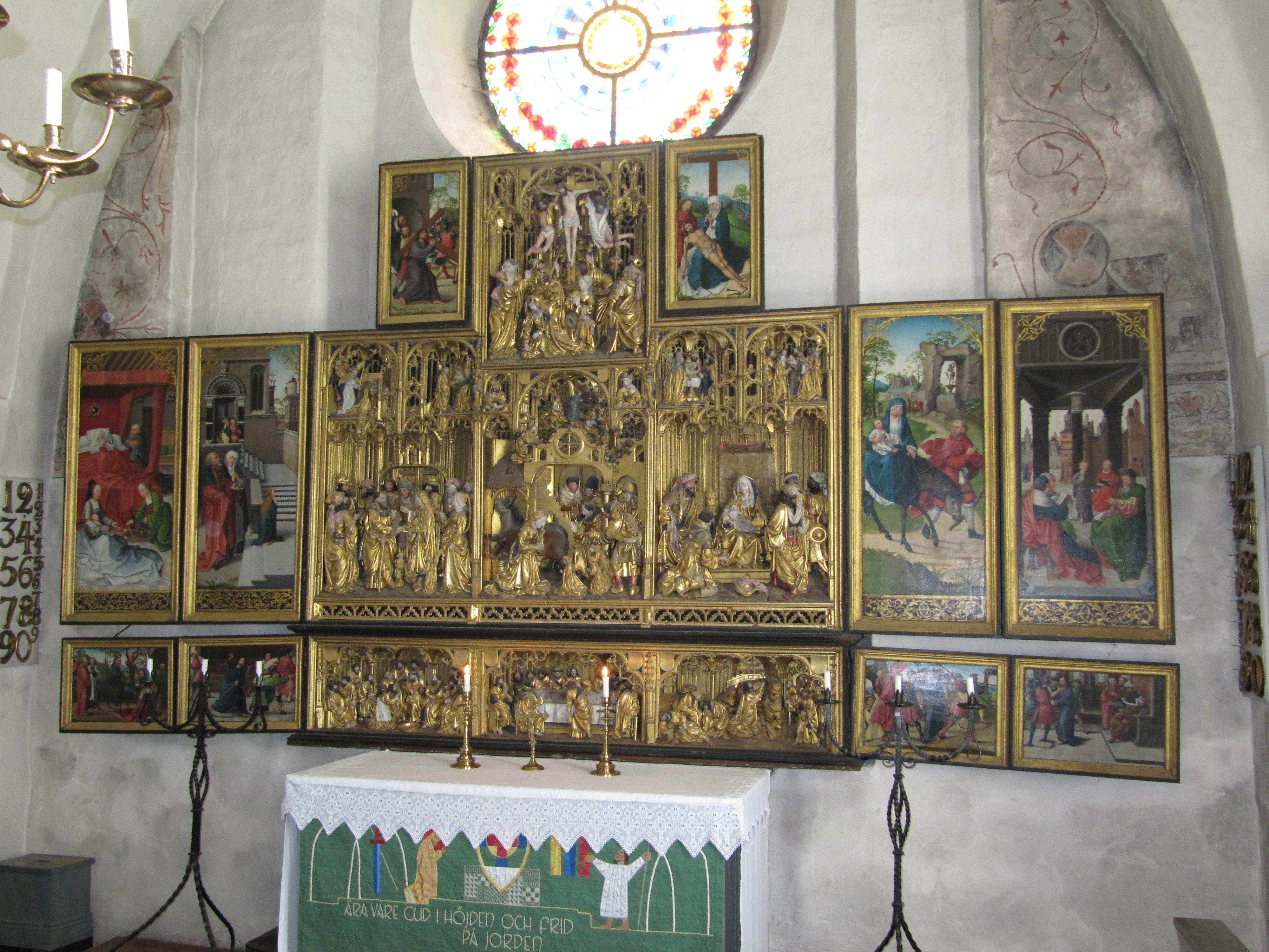 Altarskåp i Skepptuna kyrka. Altarskåpet är högaltarets praktfulla prydnad och kyrkans dyraste ägodel. Det inköptes någon gång strax efter sekelskiftet 1500 och berättar i myllrande scener om Maria och Jesu liv. I de två mellersta skildringarna har Jesu födelse och konungarnas tillbedjan ställts mot avrättningen på Golgata. Skåpet har tillverkats i Bryssel i Jan Bormans verkstad.